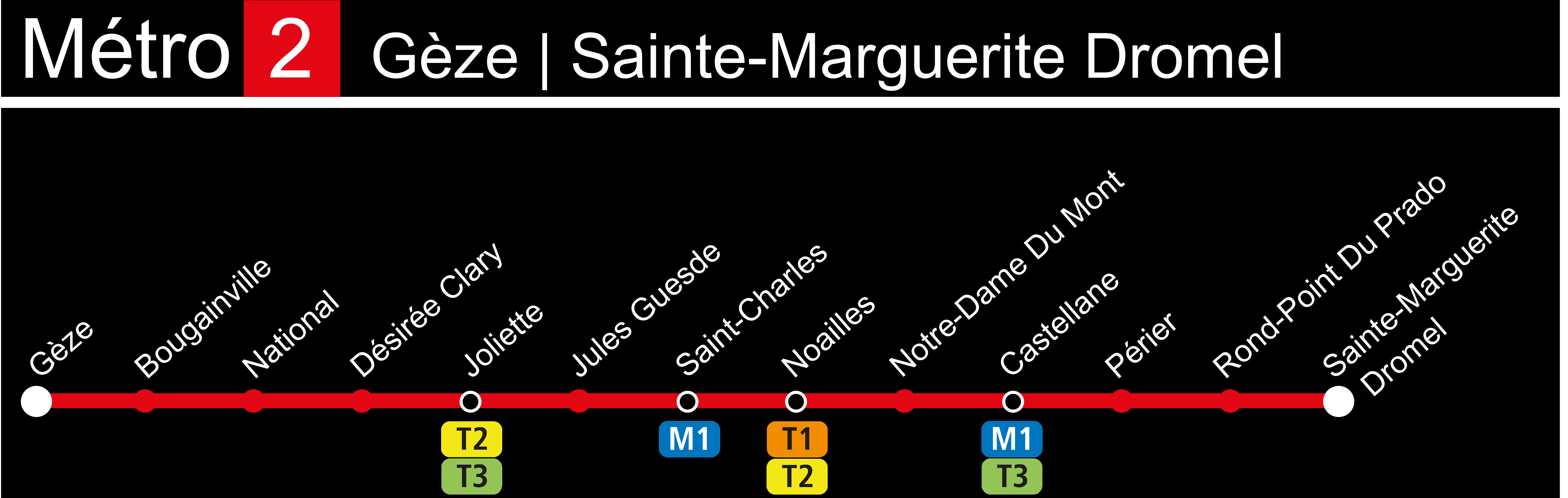 Réalisation des affichages des stations de la ligne affiché dans les stations de métros